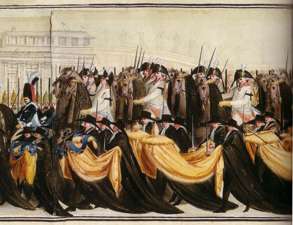 Вторичные похороны Петра III, 2 декабря 1796 г. Составить представление о том, как выглядела траурная процессия мы можем по ее изображению, сделанному неизвестным (по всей вероятности, итальянским) художником. Изображение это представляет собой рулон длиной 15,8 м и шириной 0,75 м. За ними следует шествие духовенства с хоругвями и церковный хор. Несколько генералов несут на подушках ордена и две земельные короны Петра III, сопровождаемые строем лейб-гусар и "Кирасирского наследника полка". На фоне процессии выделяются царский жезл и скипетр и Большая императорская корона, которую по приказанию Павла I несли граф А. Ф. Орлов, князь П. Б. Барятинский и П. Б. Пассек - участники убийства императора.